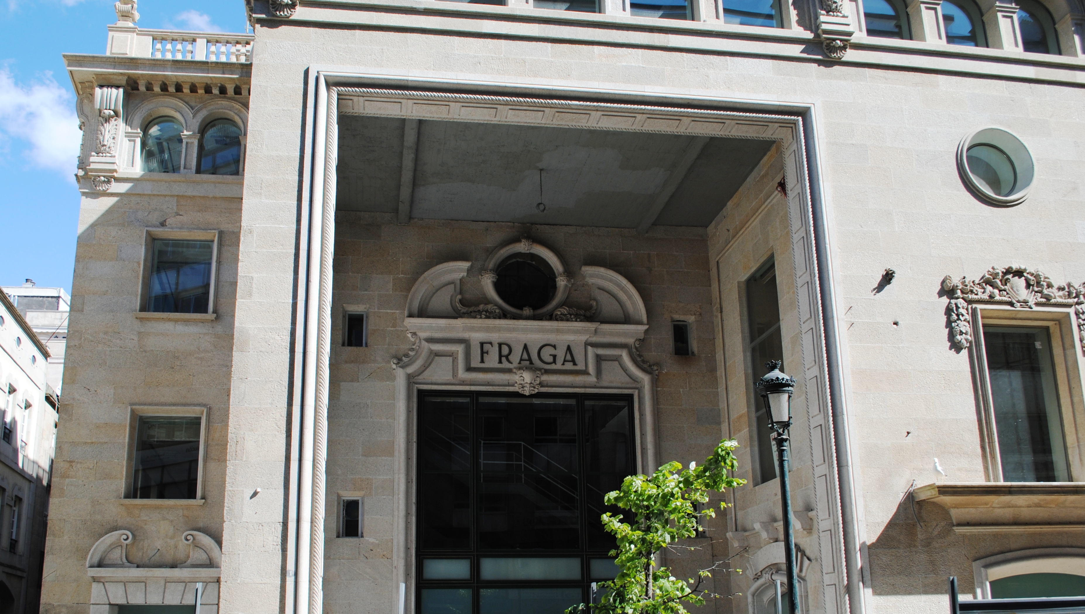 Fraga, Luis Gutiérrez Soto, César Portela, Vigo